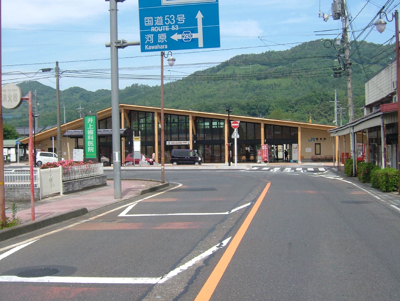 郡家駅2015年5月24日